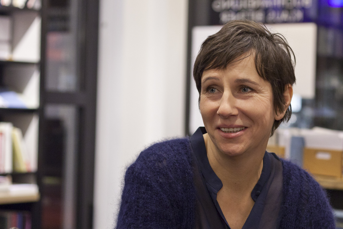 Angelika Klüssendorf in der Kölner Buchhandlung Bittner am 8. November 2011